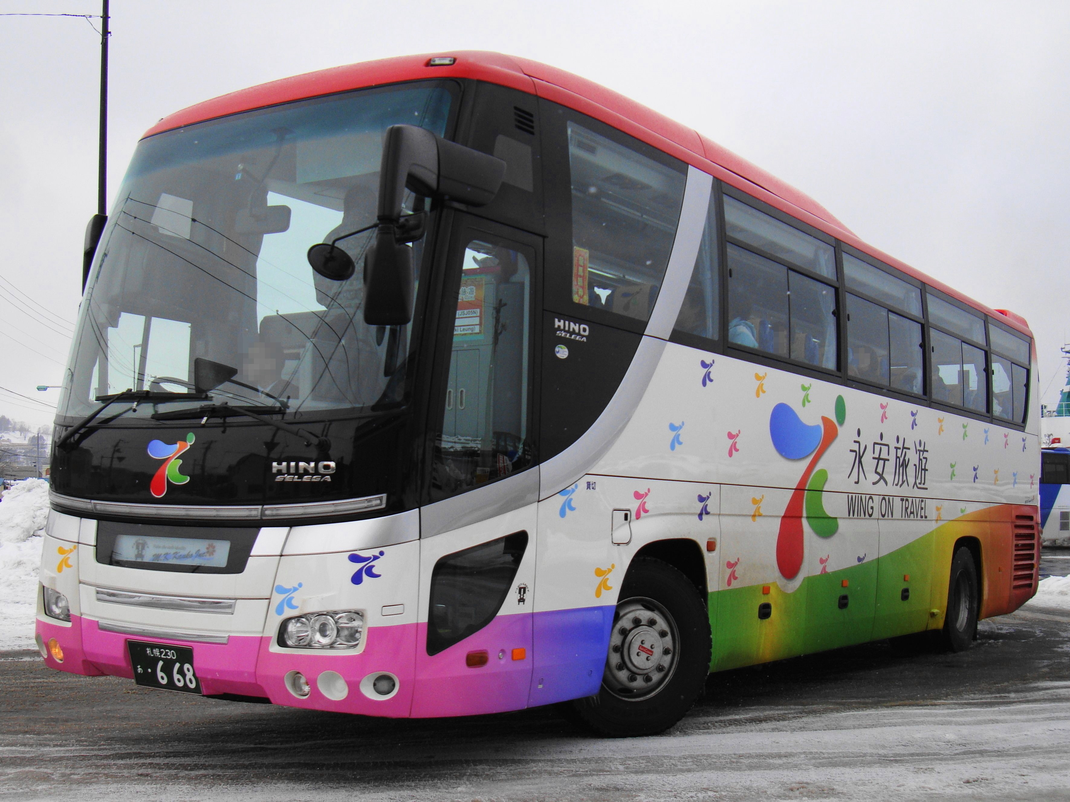 WING ON TRAVEL 永安旅遊